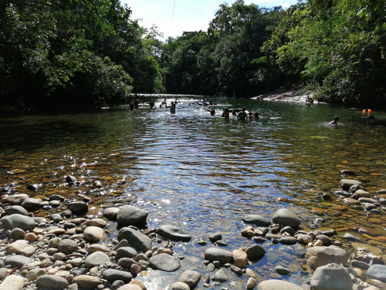 Balneario natural